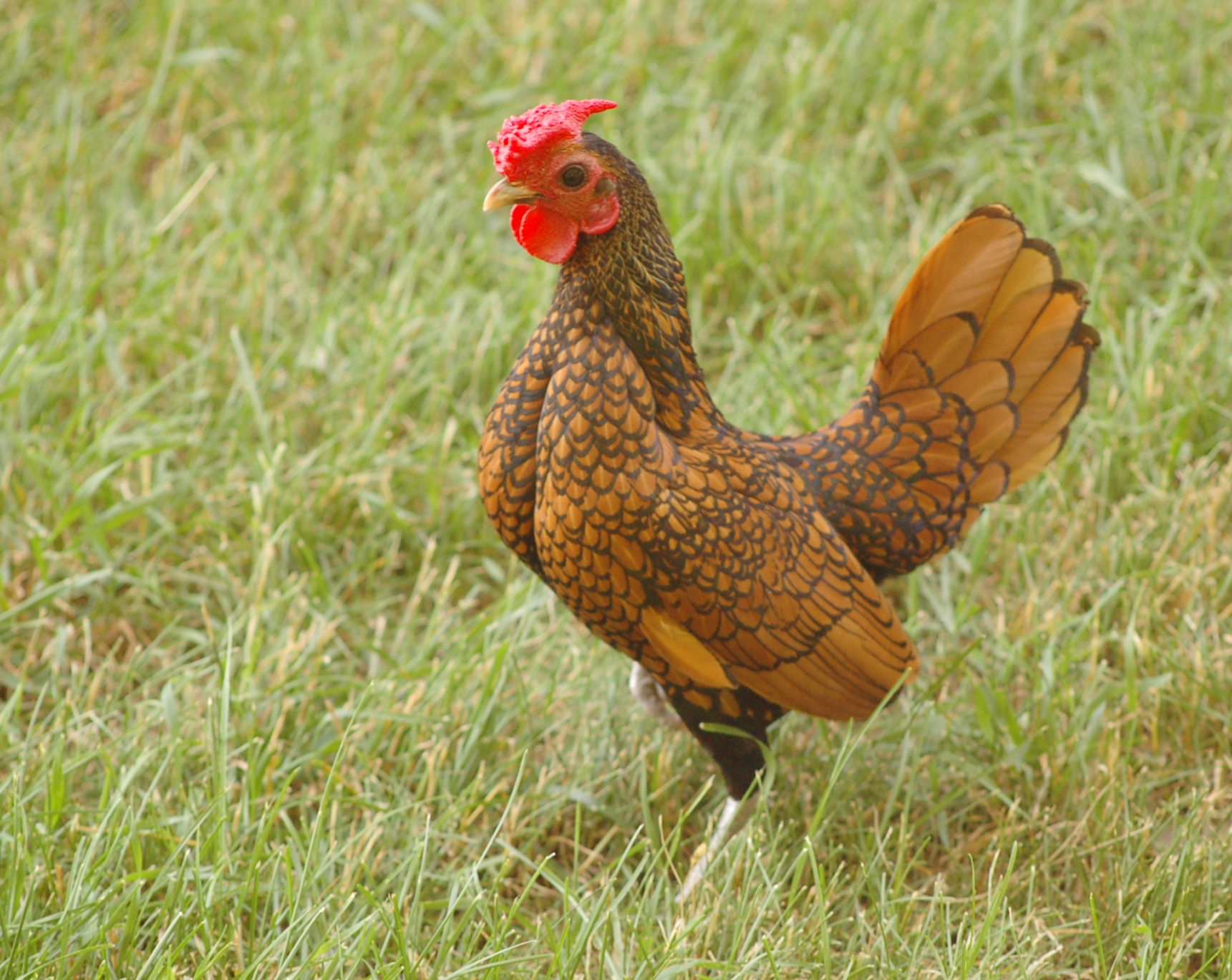 A Sebright rooster